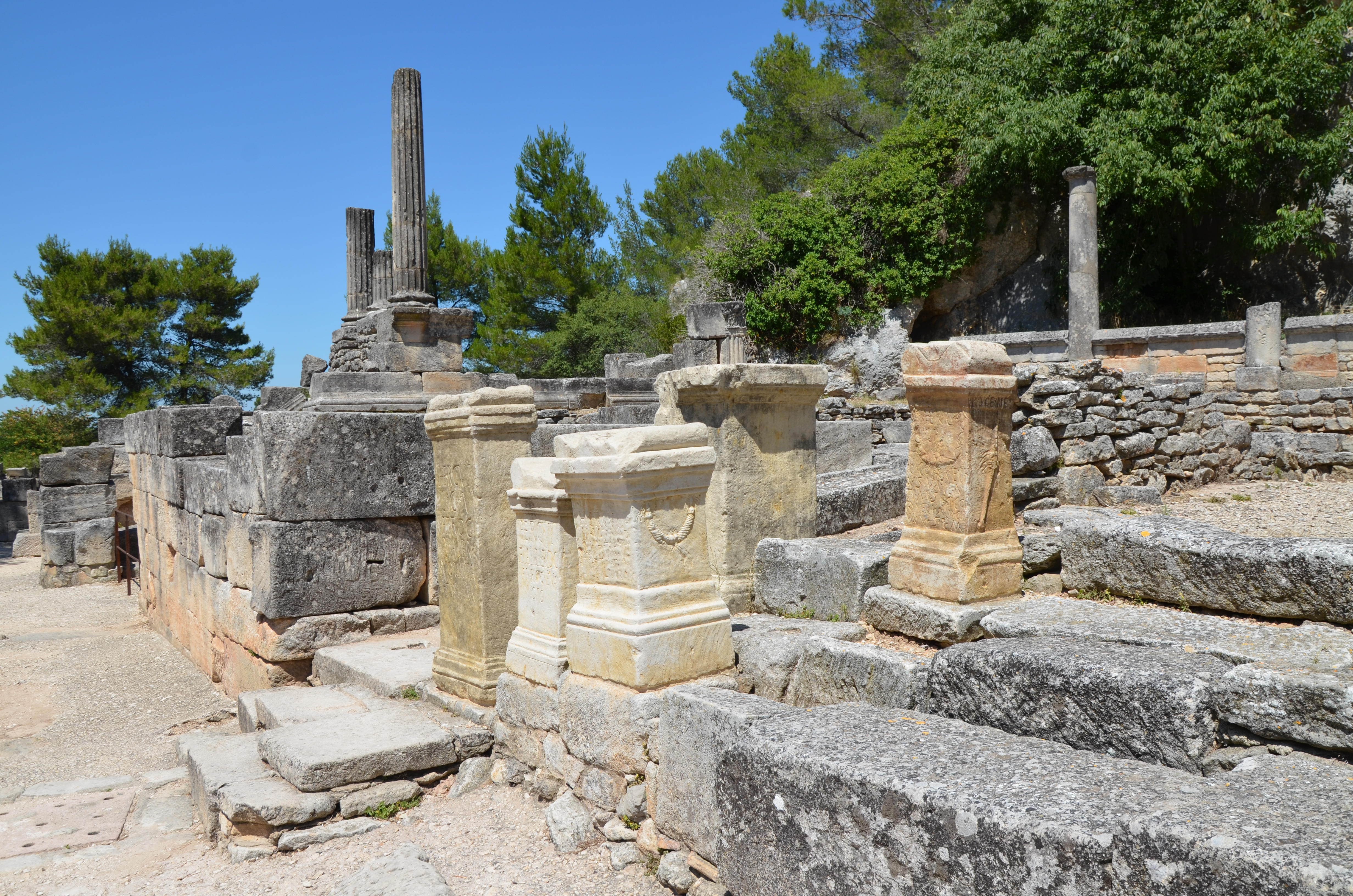 Glanum